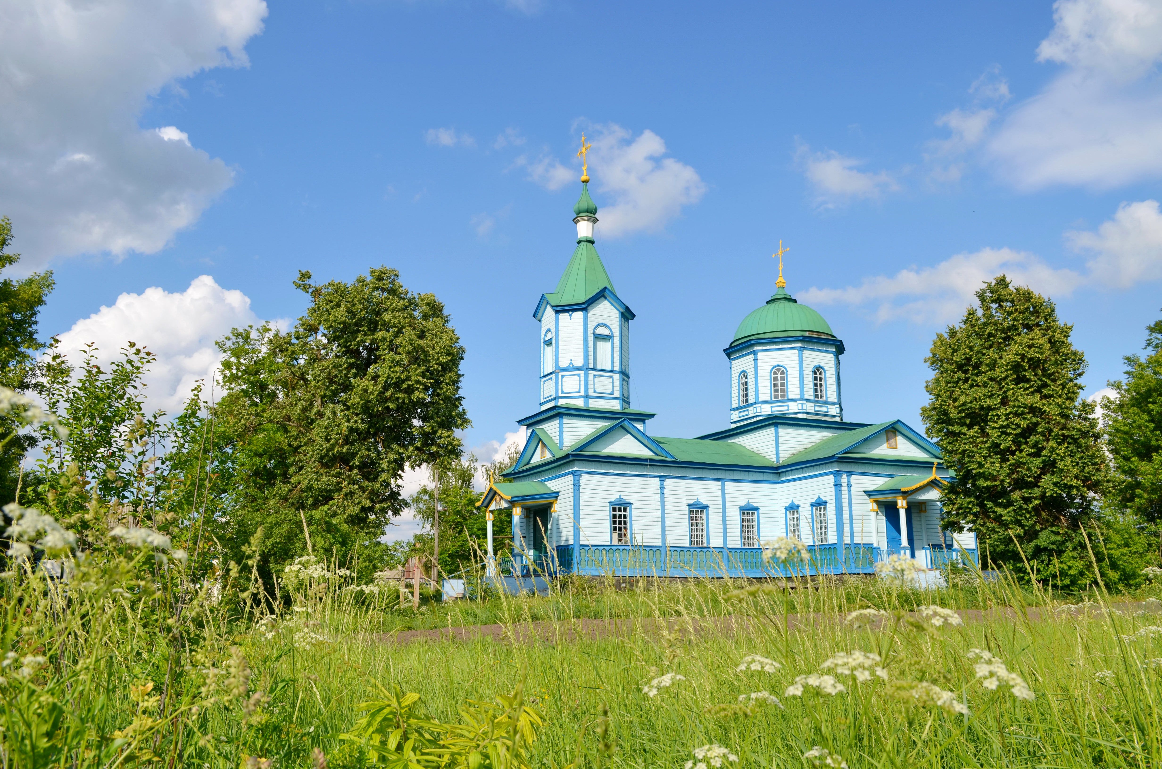 Вознесенська церква (дер.), село Лук'янівка